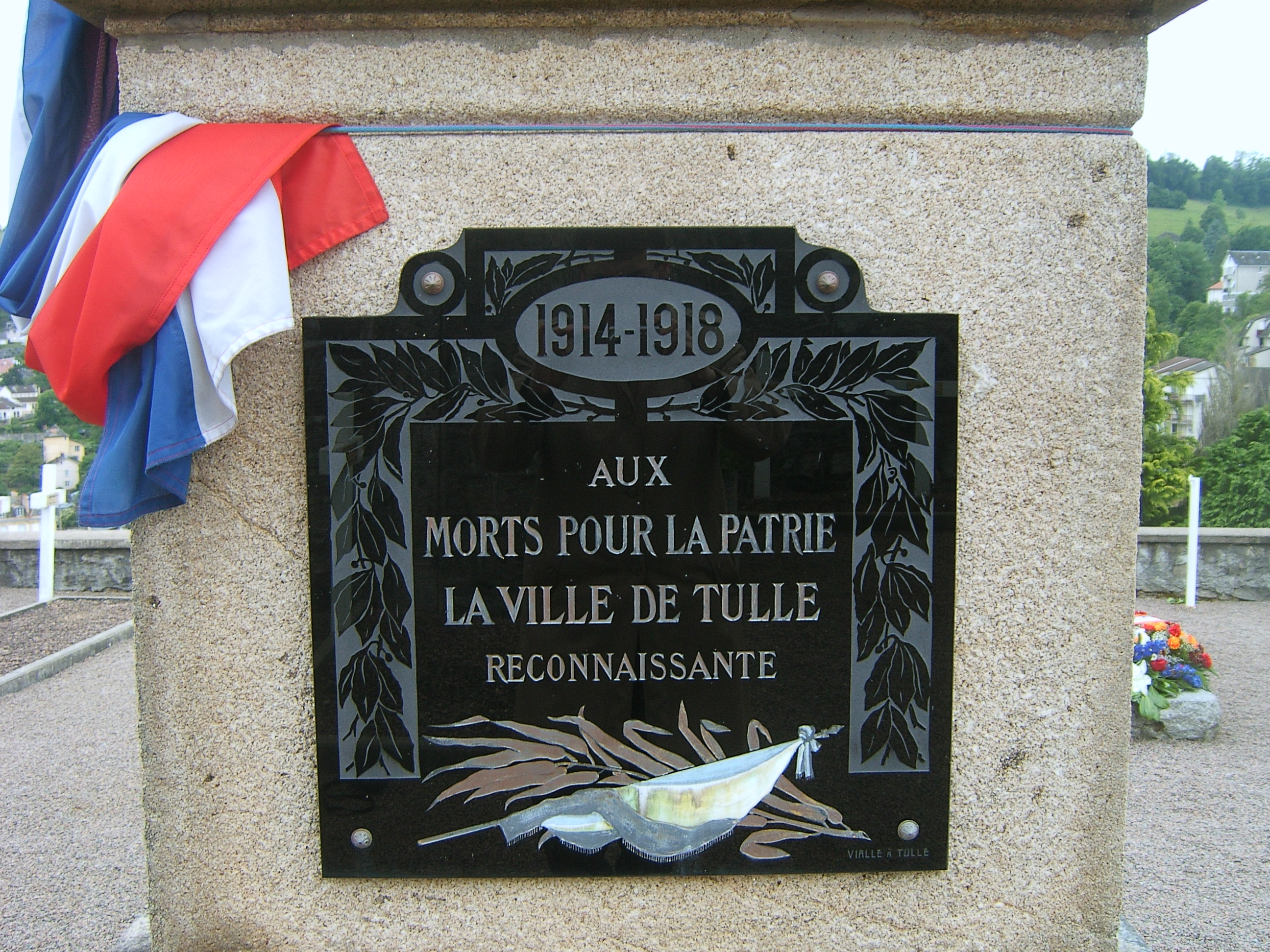 Un élément de l'obélisque du carré militaire du Puy-Saint-Clair de Tulle.